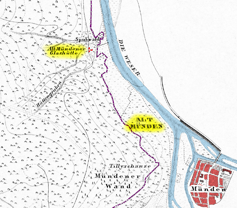 Karte des Kurfürstentums Hessen mit Altmünden, nachträglich koloriert